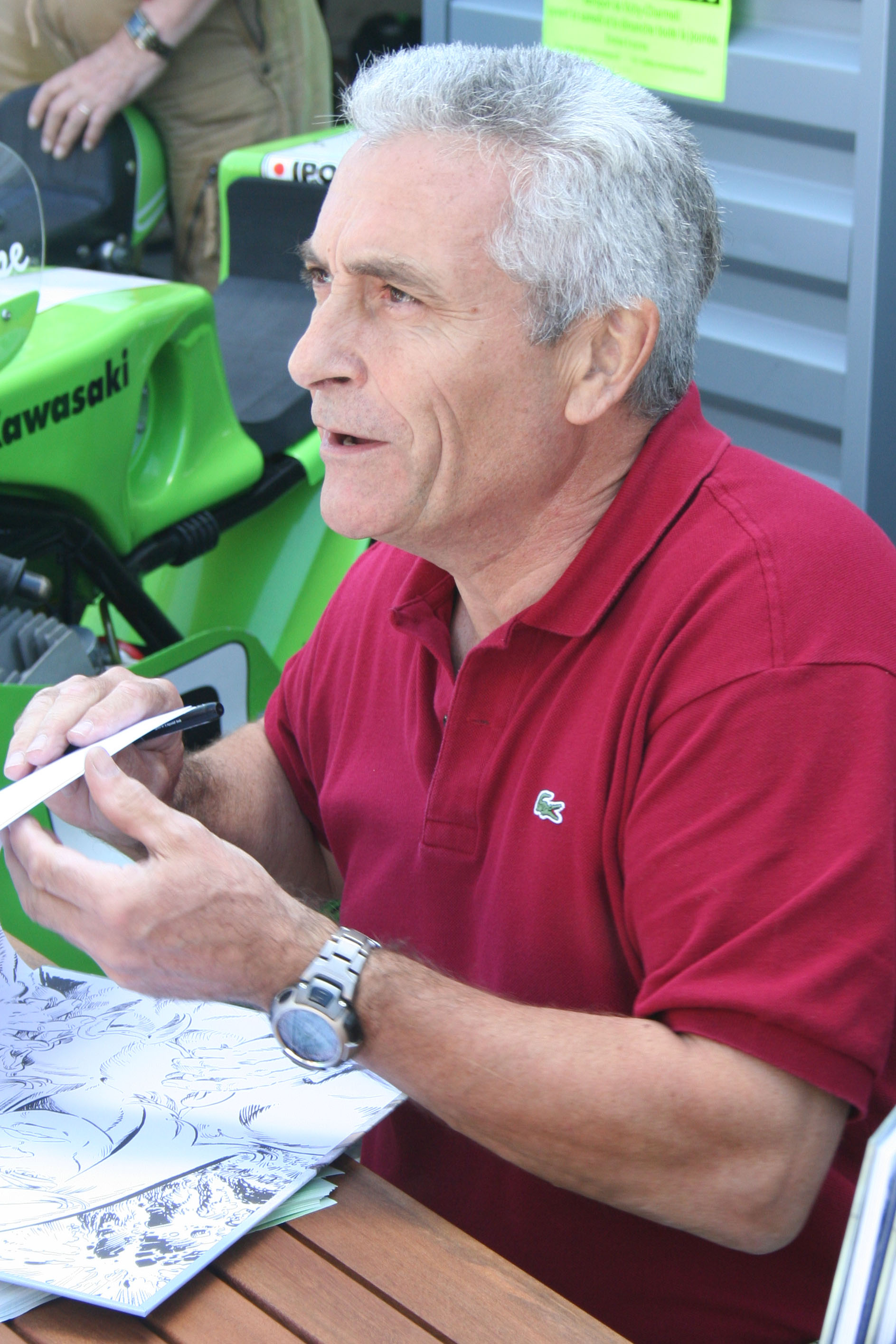 Jean-François Lecureux, scénariste de bande dessinée français, lors des coupes moto légende, 2009